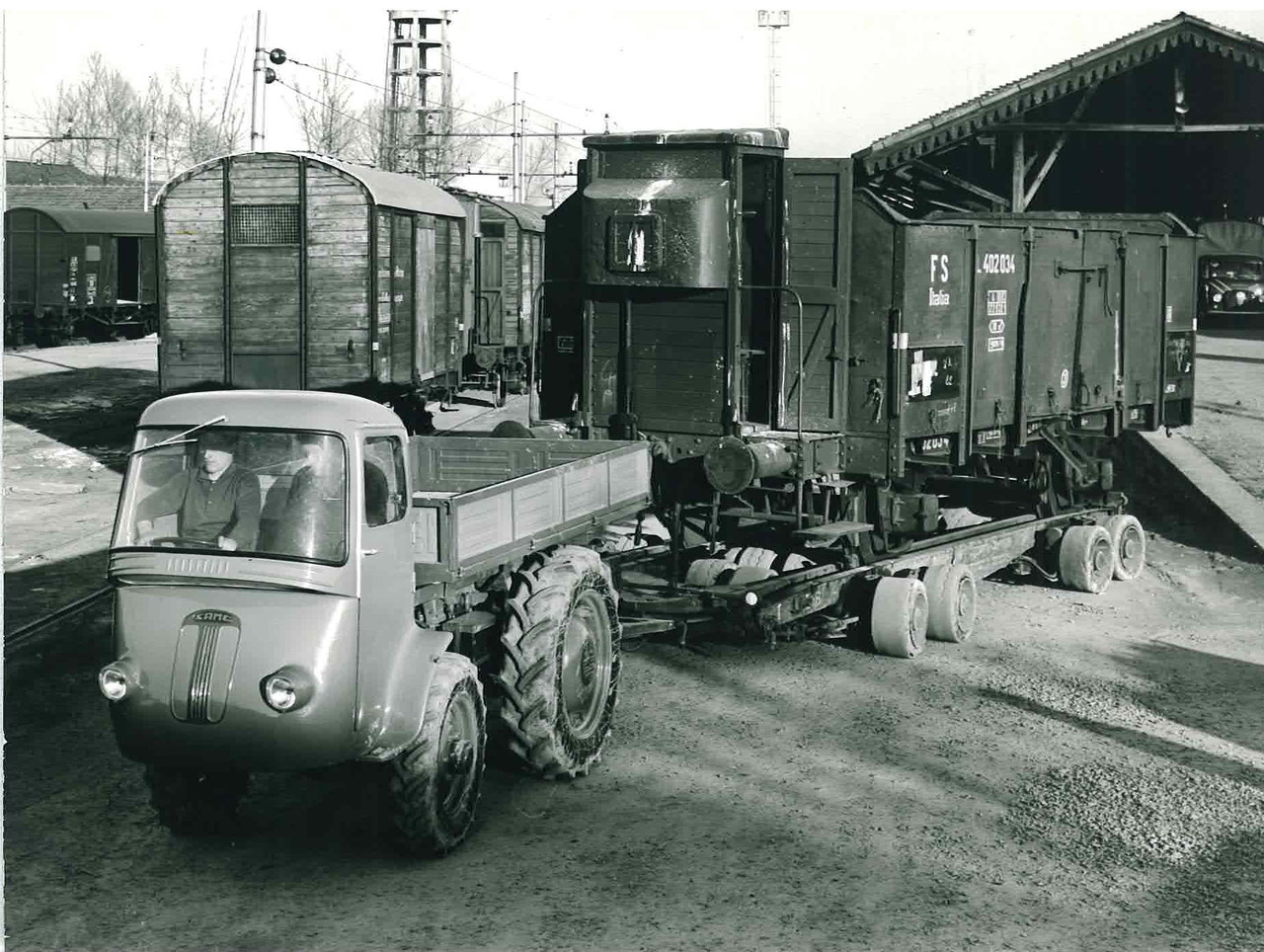 Samecar industriale